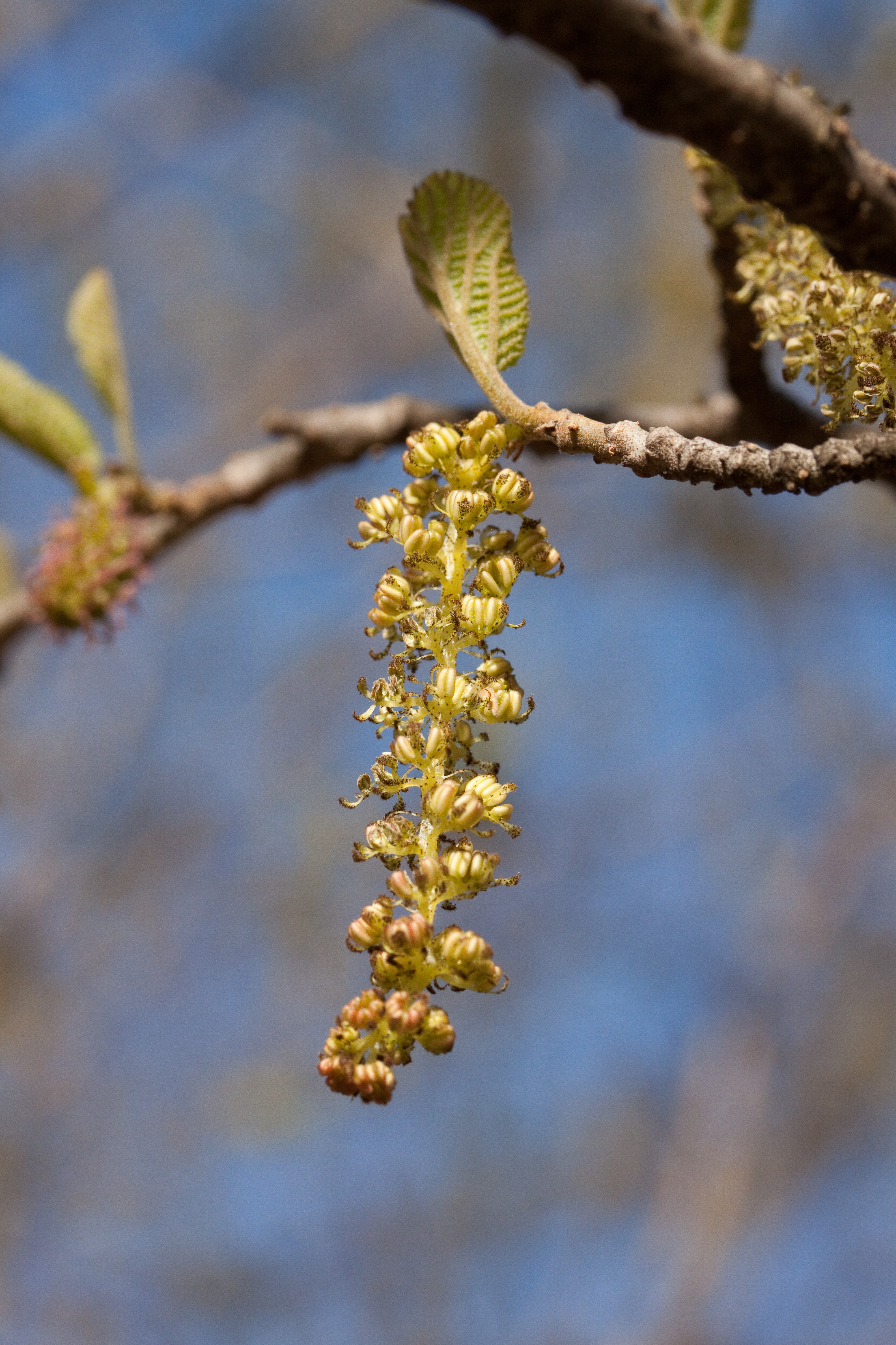 Epi floral de Sinowilsonia henryi - Jardin des Plantes - Paris - France